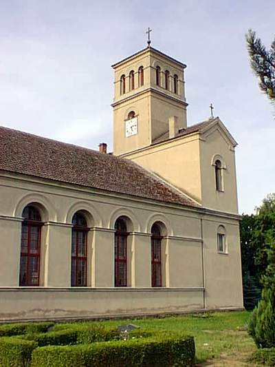 Schinkelkirche in Wuthenow, Ortsteil von Neuruppin, Brandenburg, Deutschland